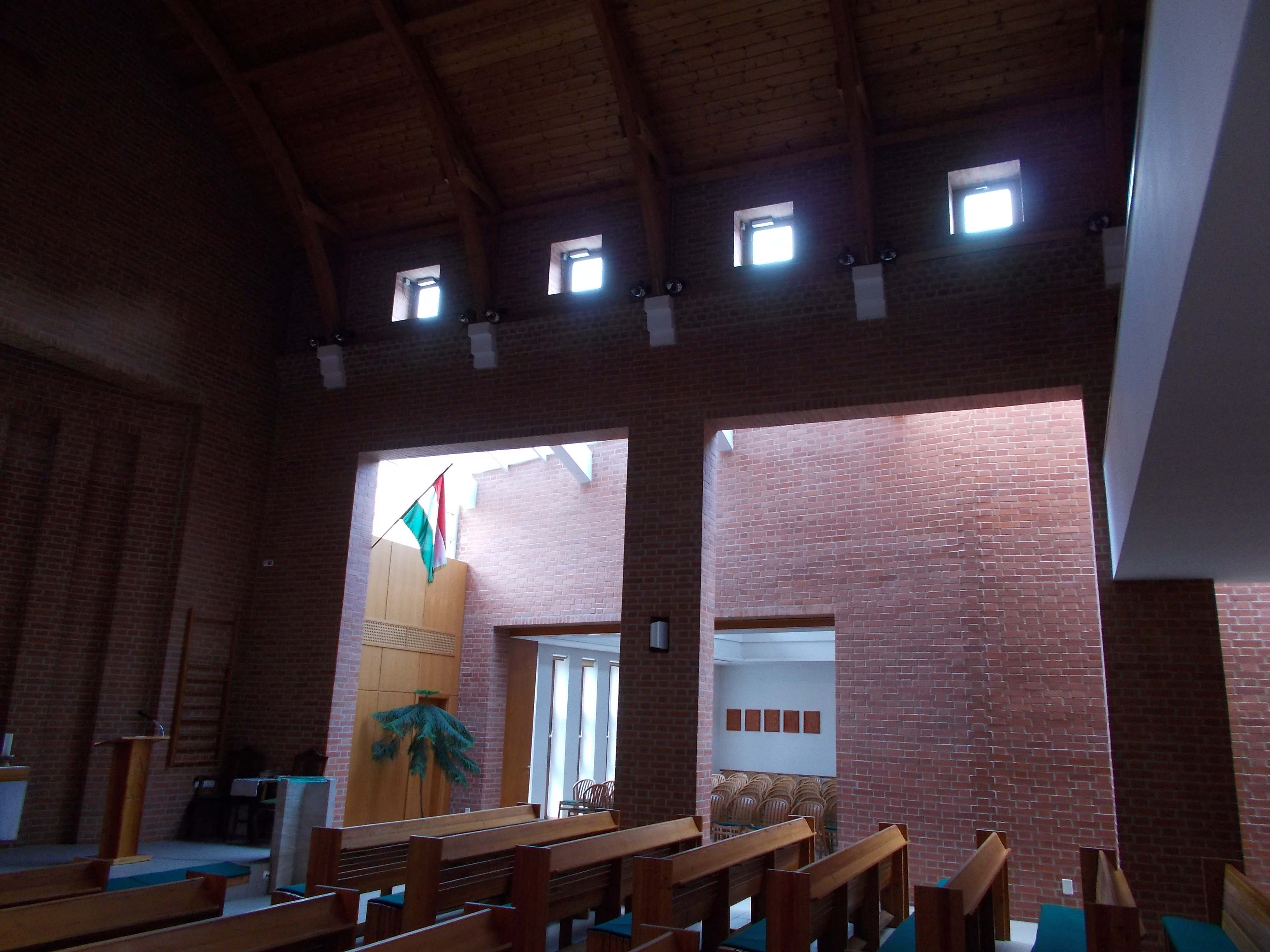 A budahegyvidéki evangélikus gyülekezet temploma.- Kék Golyó utca, 17. Budapest 12